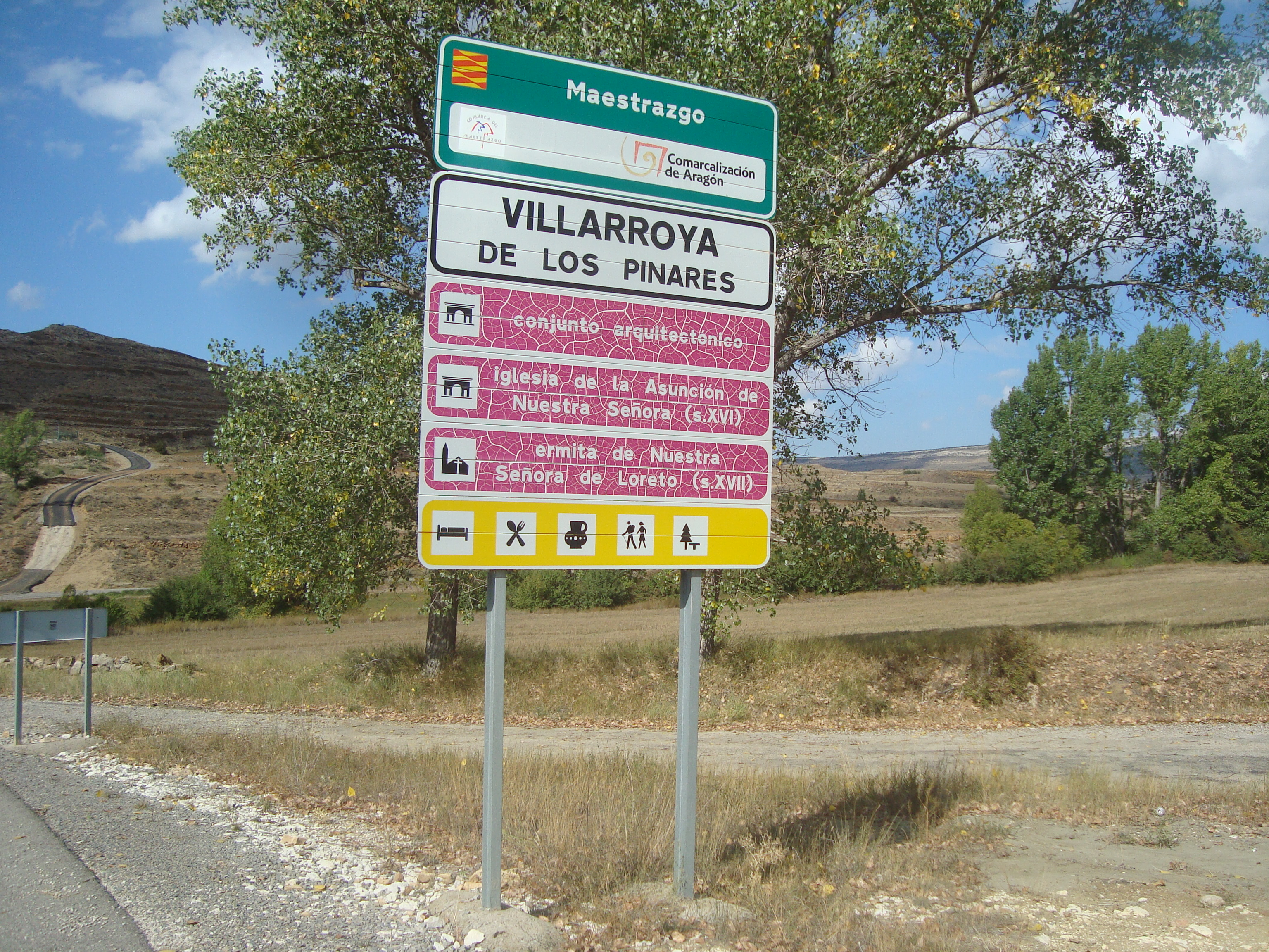 Villarroya de los Pinares (Teruel). Señalización turística.